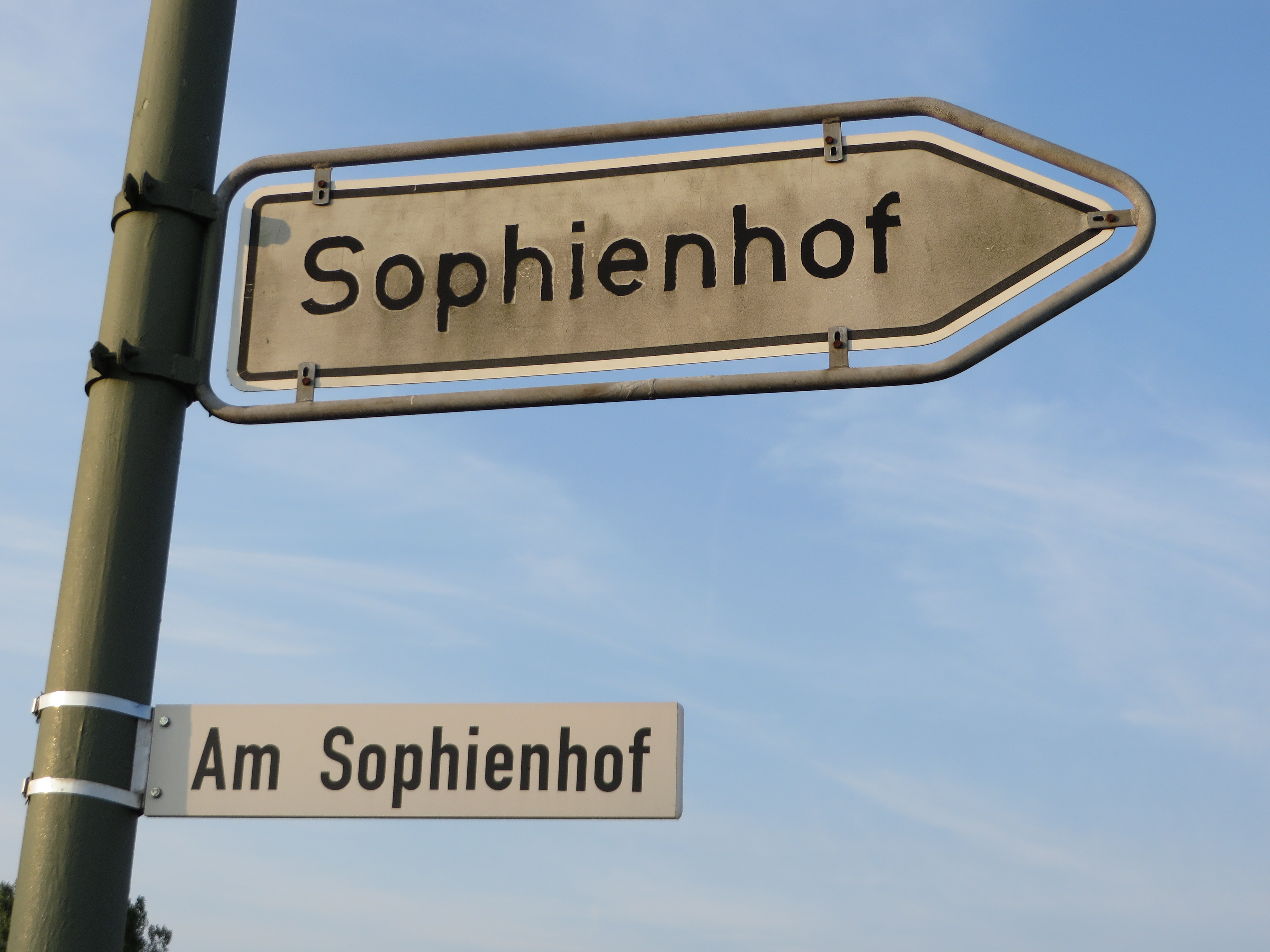 Hinweisschild Sophienhof und Straßenschild Am Sophienhof (Flensburg), Bild 003